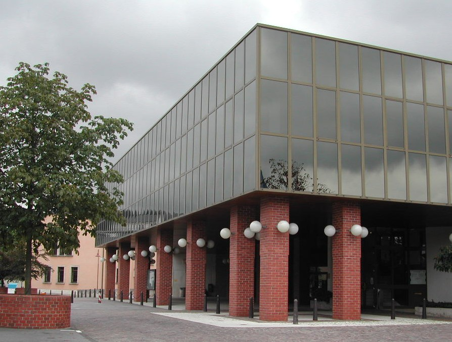 D´Gemeng zu Walfer. Kategorie:Gemeng Walfer